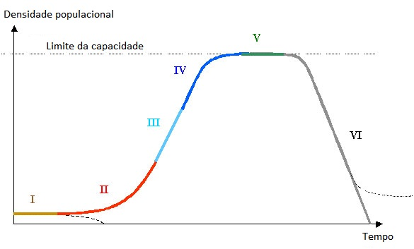 O gráfico mostra as fases que a população pode passar em seu desenvolvimento.